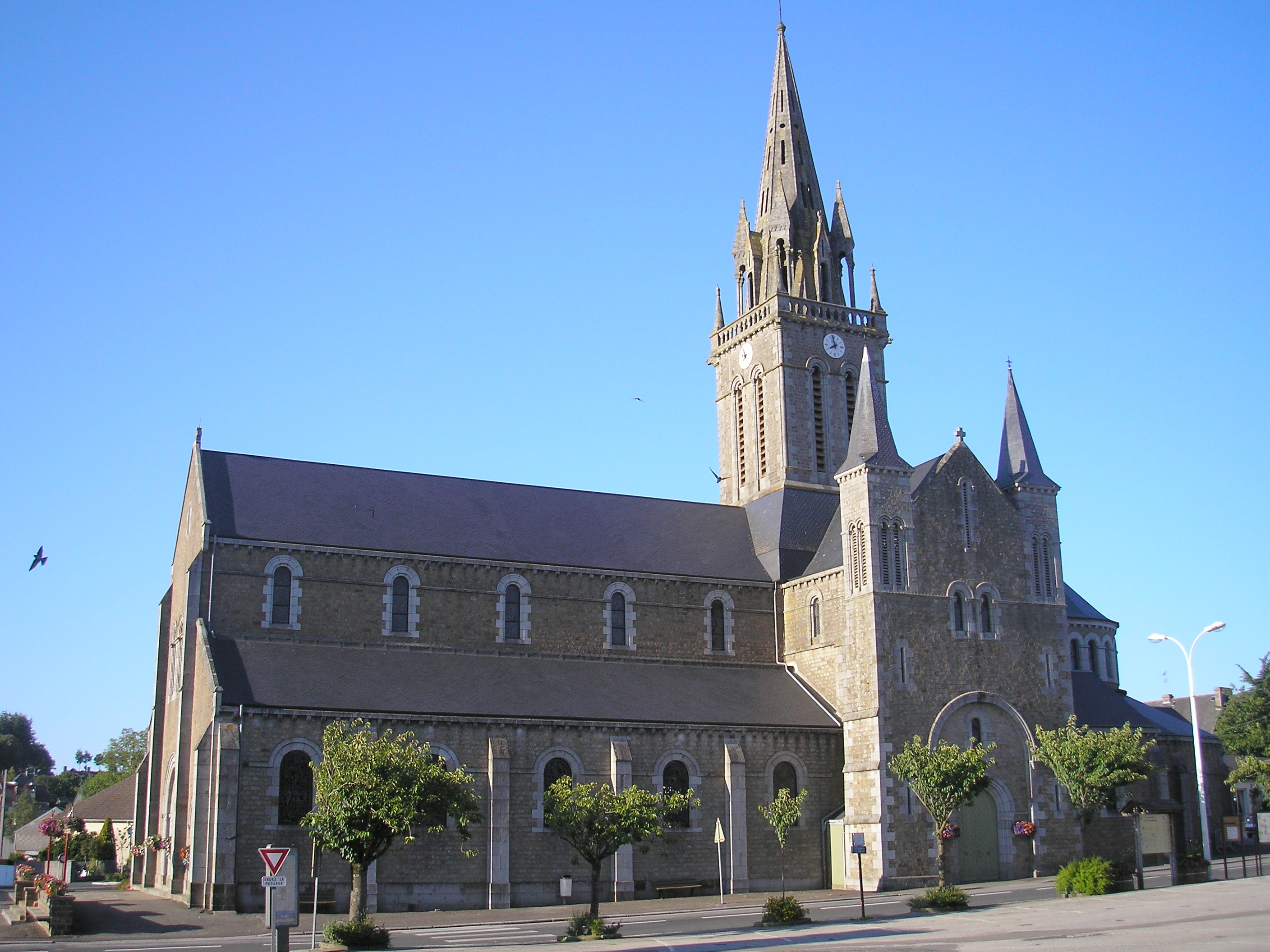 Sourdeval (Normandie, France). L'église.